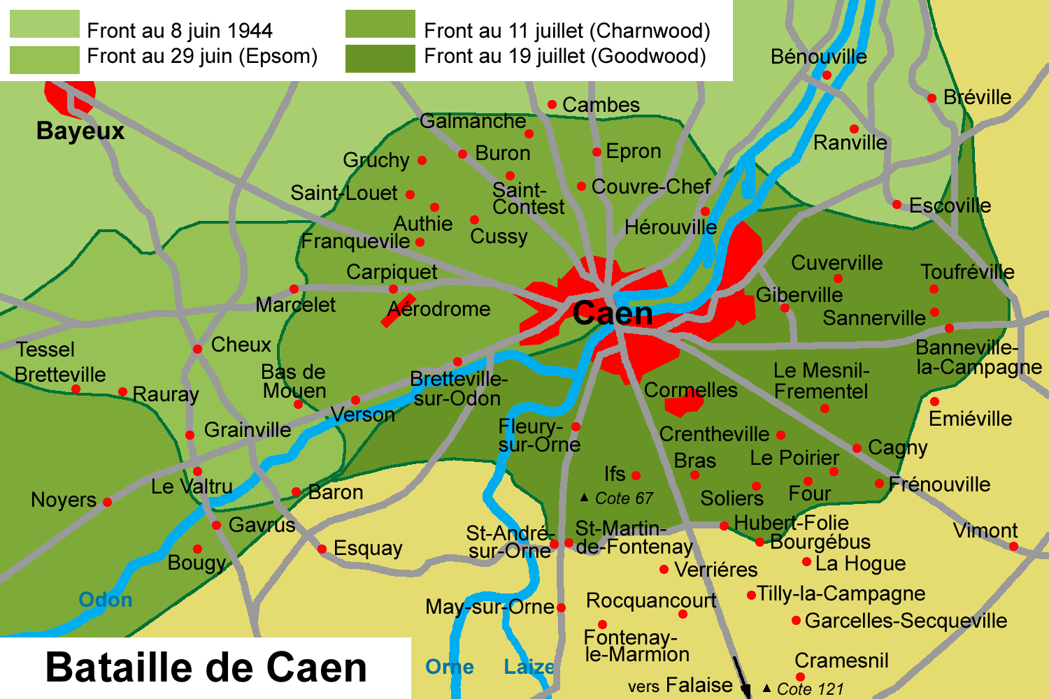 fronts successifs lors de la bataille de Caen